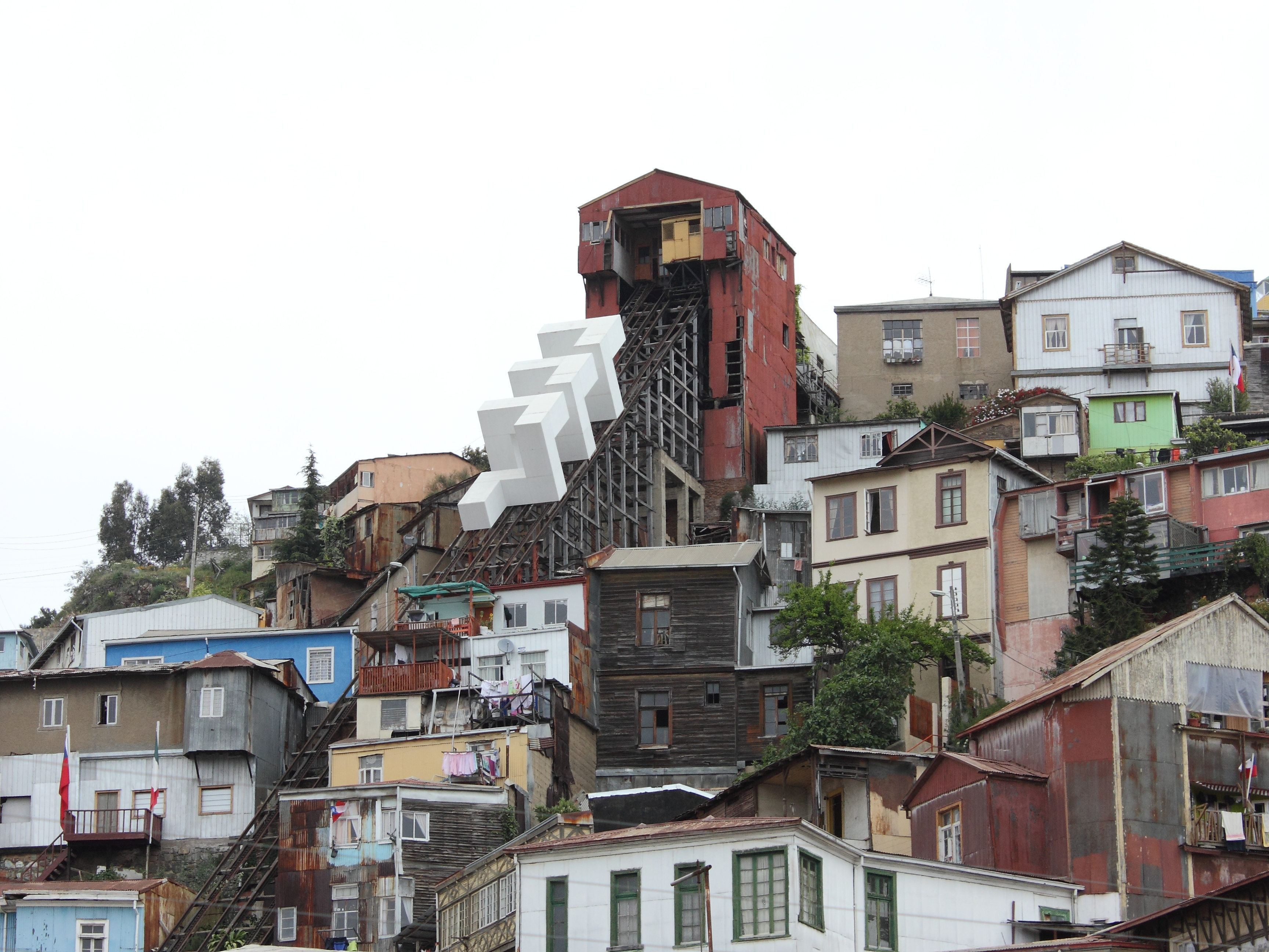 Ascensor Monjas This is a photo of a national monument in Chile: 772